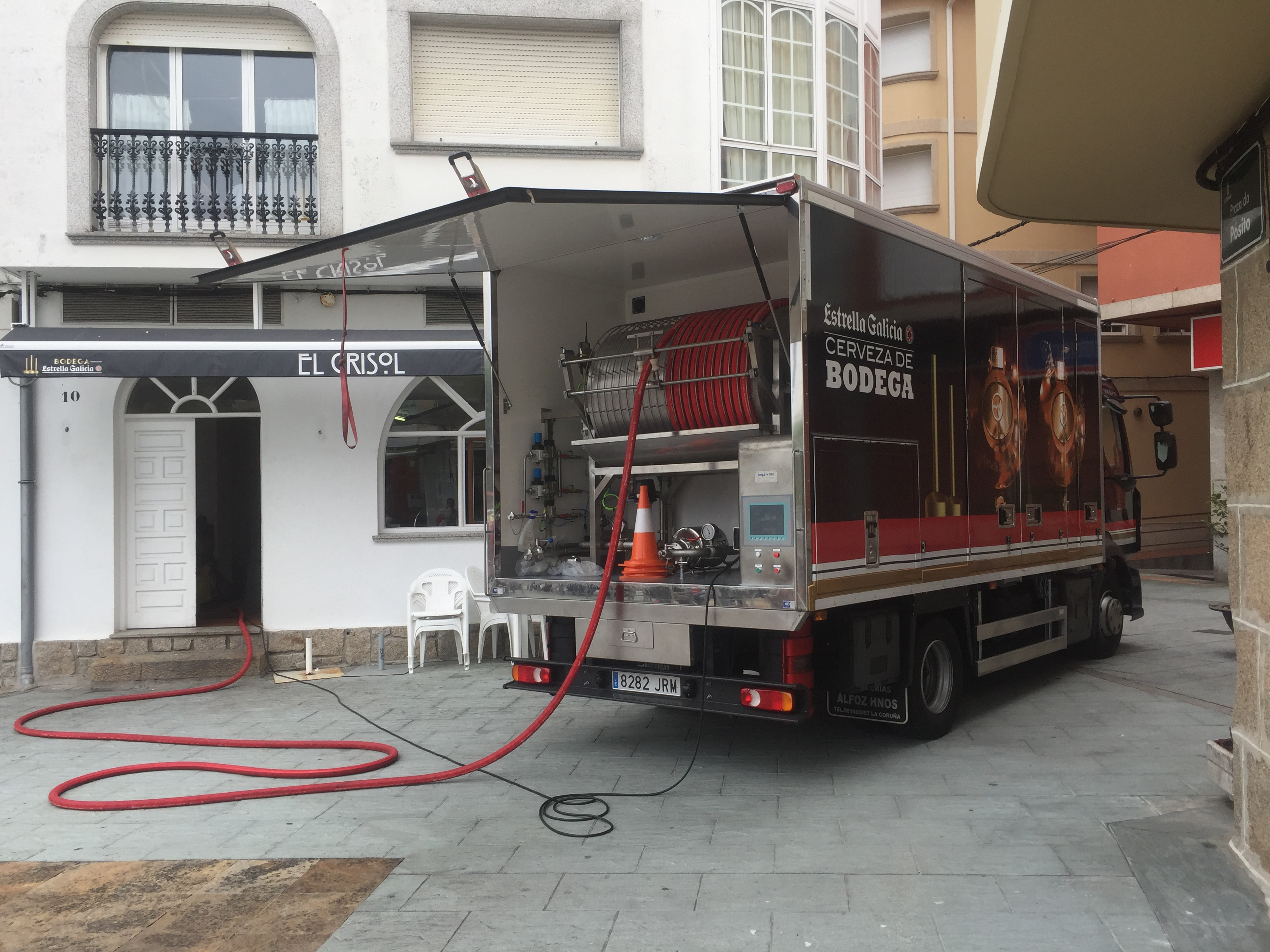 Camión cisterna de cerveza Estrella Galicia